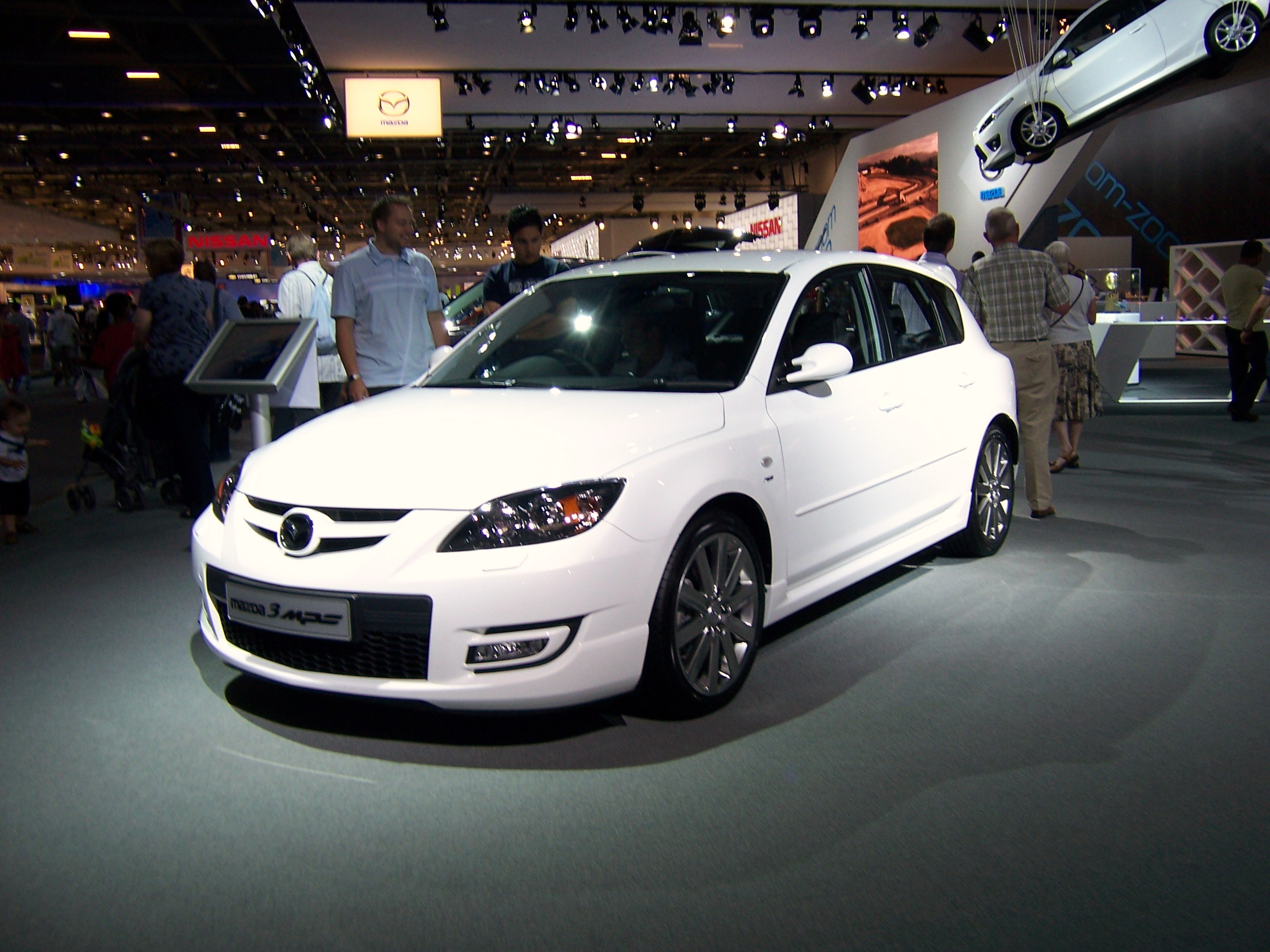 Mazda 3 MPS